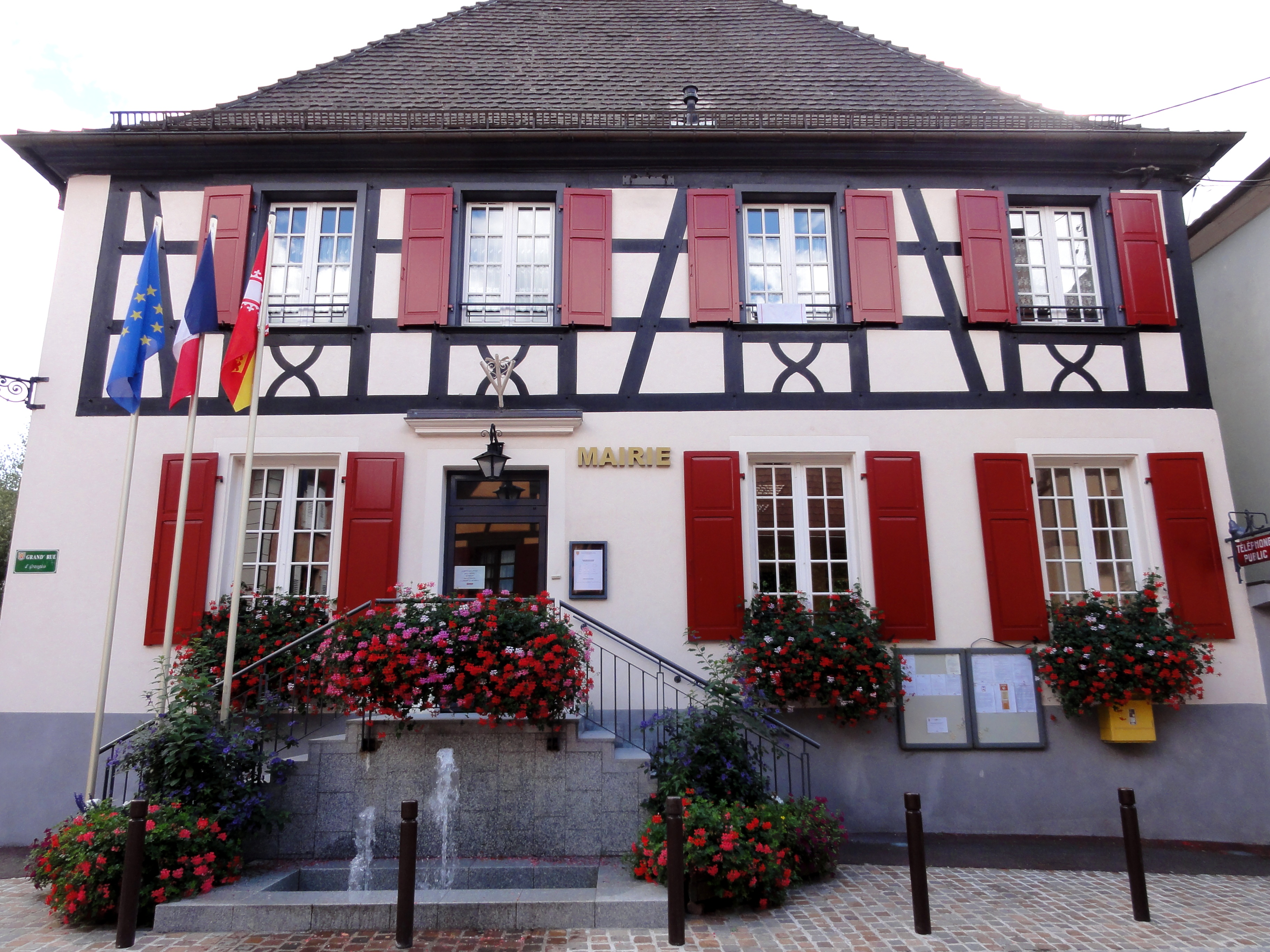 Alsace, Haut-Rhin, Soultzbach-les-Bains, Mairie-école (XVIIIe-XIXe), Grand'Rue.